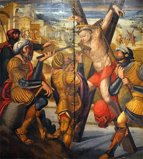 Crucifixió de Sant Feliu, del retaule del sant, per Joan de Borgunya, pintat en 1518-1521. Museu d'Art de Girona, Girona